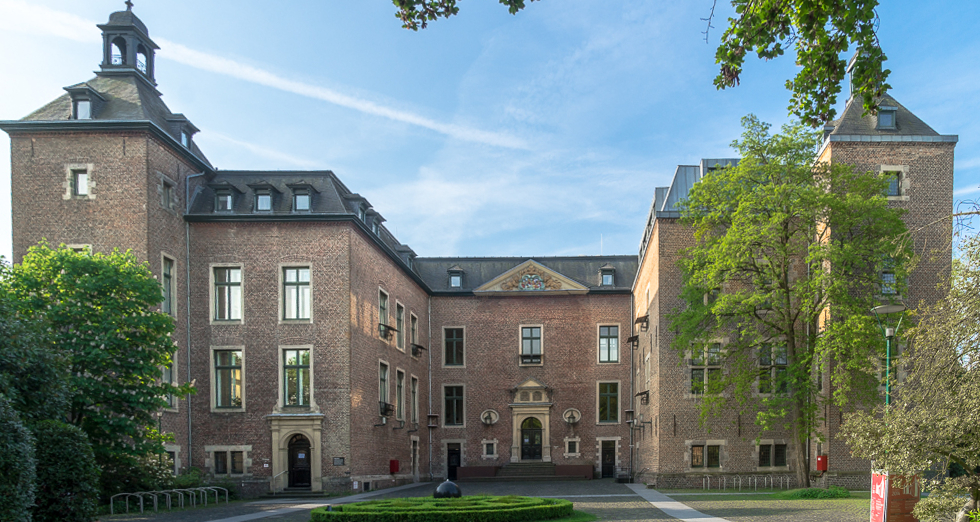 Schloss Neersen, Vorderseite